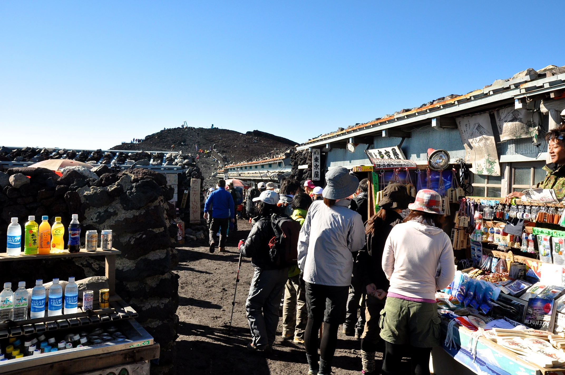 富士山登山2010 (Mt. Fuji Climb)